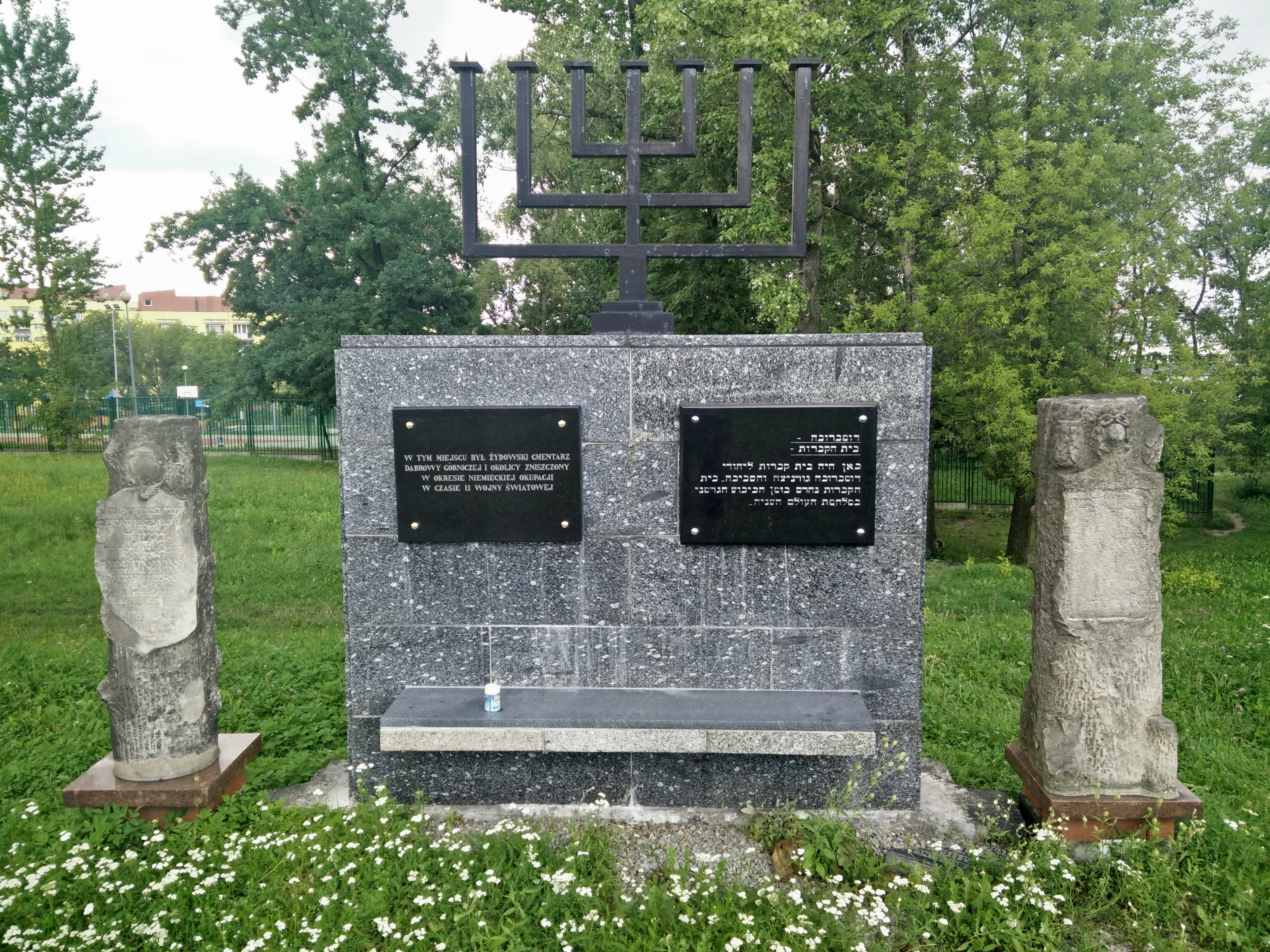 tablica upamiętniająca cmentarz żydowski w dąbrowie górniczej